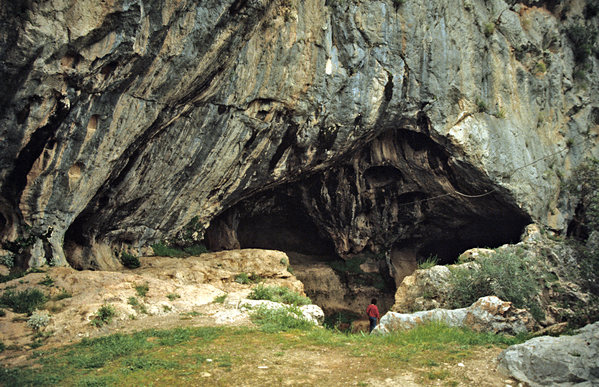 Eingang zur Karain-Höhle, prähistorischer Fundort, Türkei nördlich Antalya